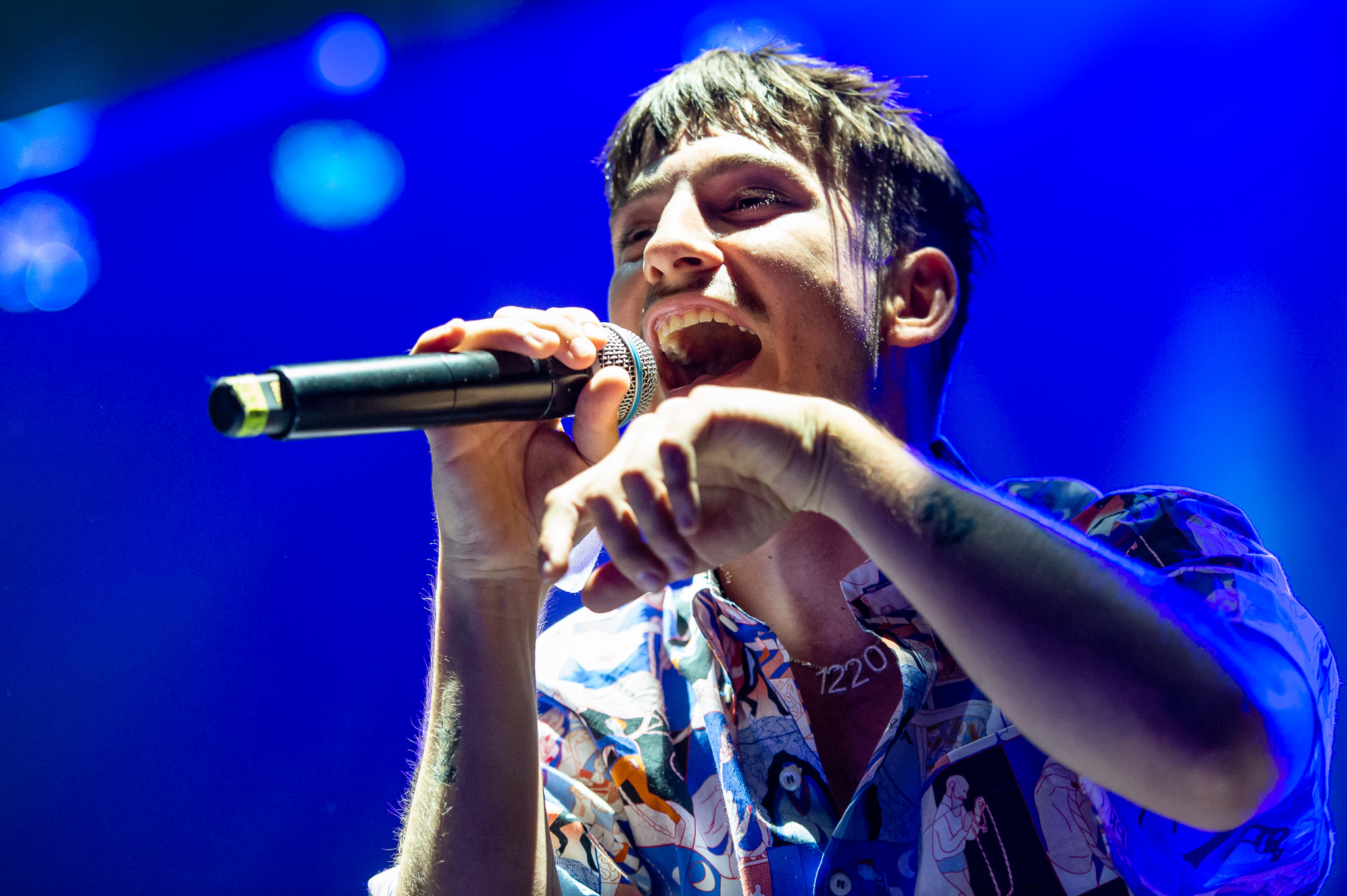 ARGO-Konzerte,Alternarena,Festival,Julian Sellmeister,Konzert,Livekonzert,Livemusik,Musik,RiP,Rock im Park 2018,Yung Hurn